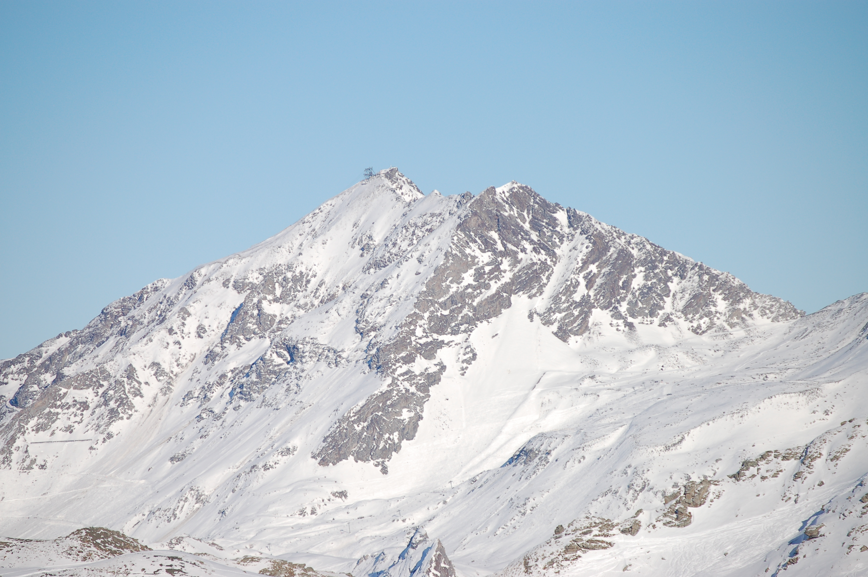 Aiguille Rouge (les Arcs, Vanoise, Savoie, France) depuis la Roche de Mio (La Plagne)